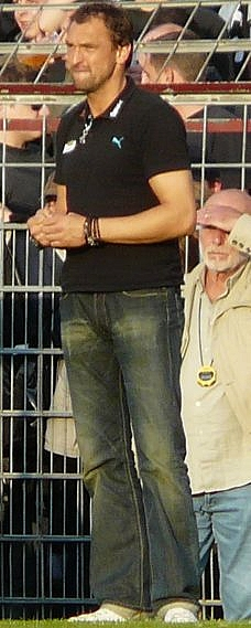 Claus-Dieter Wollitz (als Trainer VfL Osnabrück)